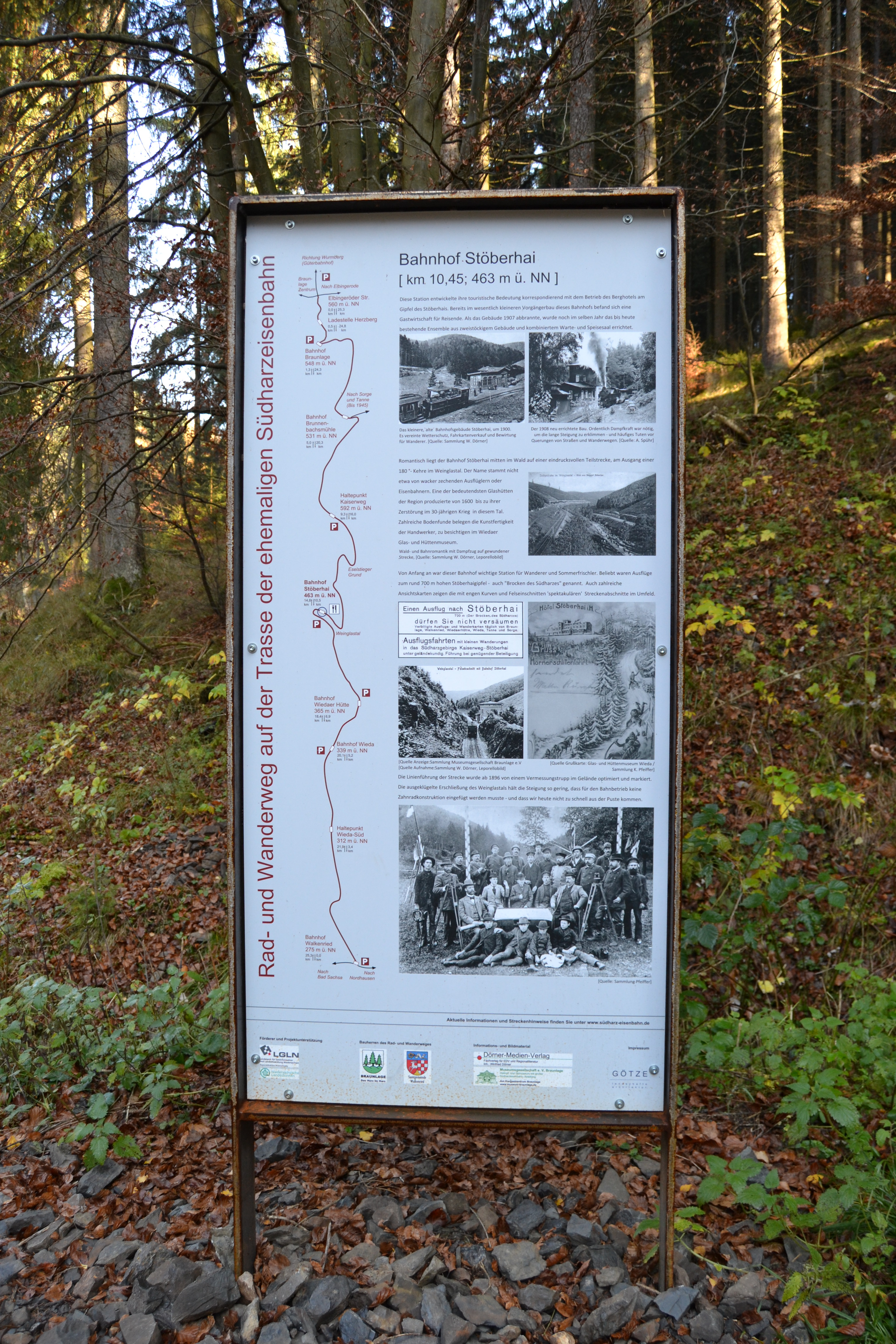 Infotafel zum ehemaligen Bahnhof Stöberhai am Ort des Südharz-Eisenbahn-Radwanderweges